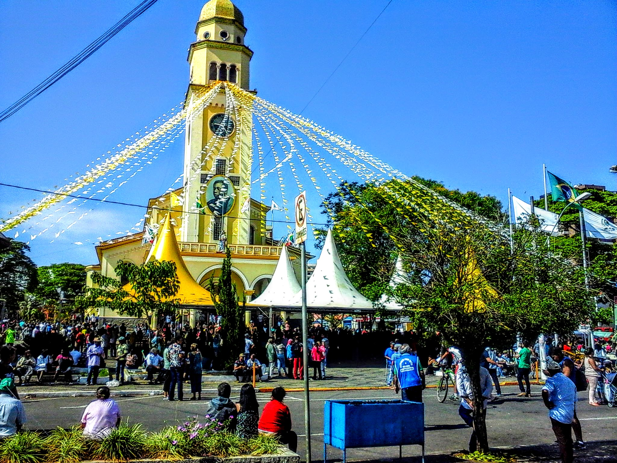 Paróquia Nossa Senhora da Ajuda, 23 de Setembro de 2019.